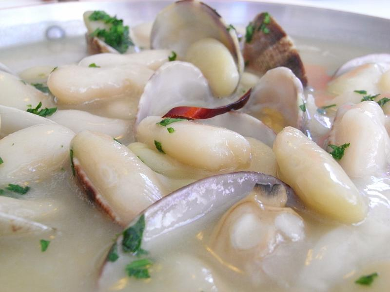 Fabes con almejas